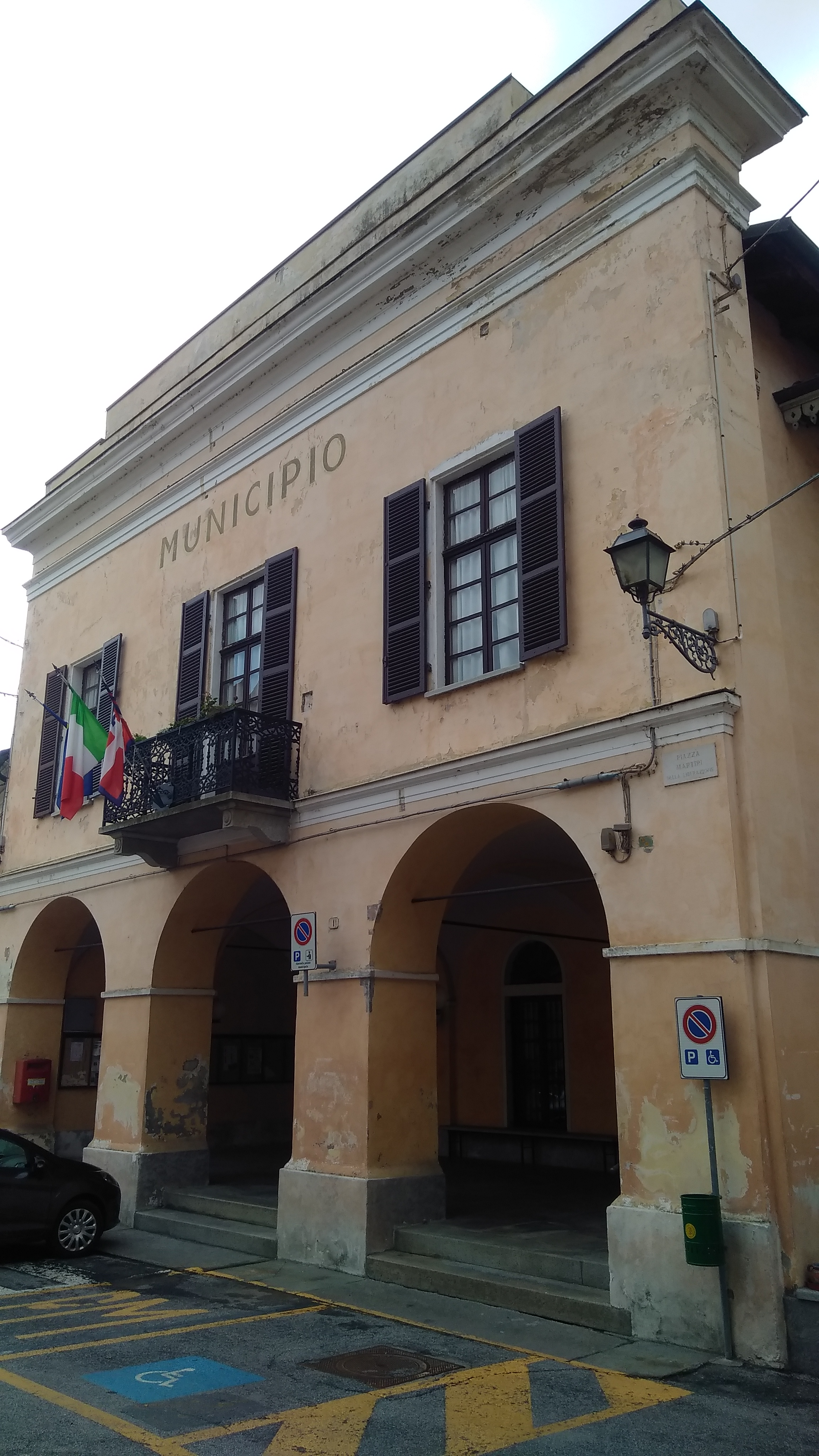 Il municipio di Piasco (CN)